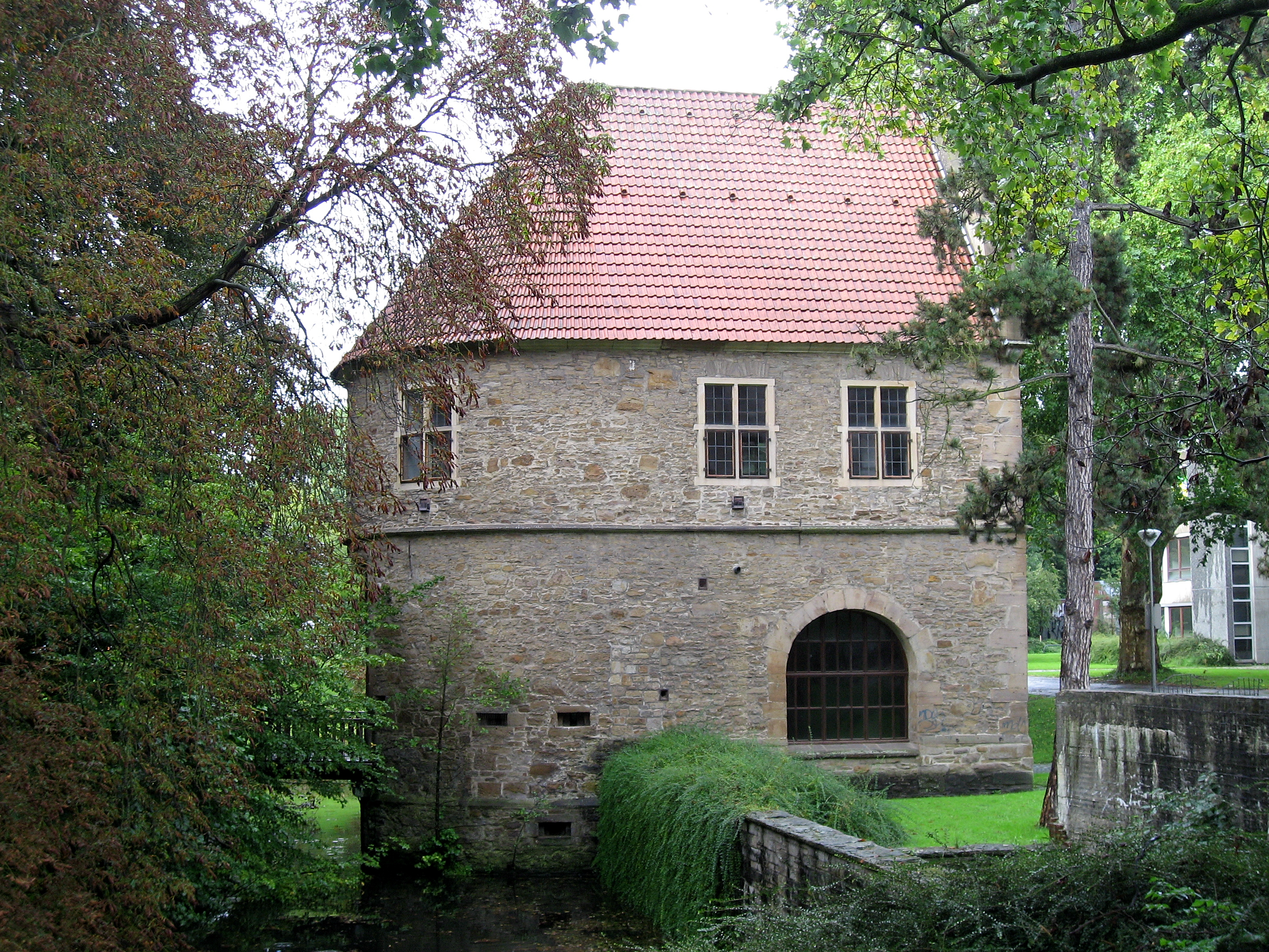 Dortmund, Rombergpark, Torhaus, Südfassade